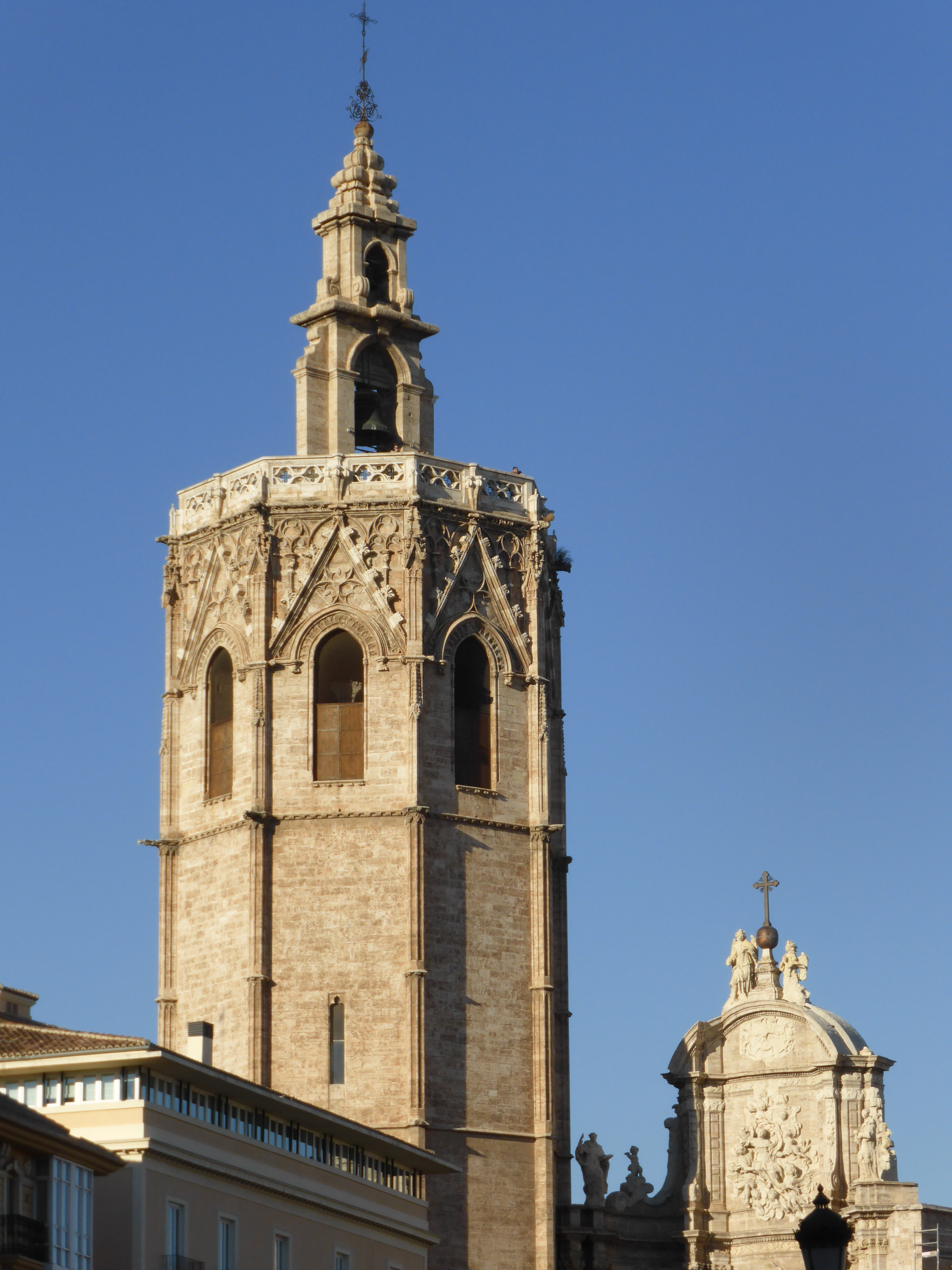 Torre de la catedral de Valencia, conocida como El Miguelete, o Micalet, de estilo gótico levantino, de comienzos del siglo XV. Tiene 51 metros de altura hasta la terraza. Posteriormente se añadió la espadaña, terminada en el siglo XVIII. A la derecha vemos la parte alta de la portada barroca de la Puerta de los Hierros, con un relieve de la Asunción de la Virgen, y remata el conjunto una cruz de hierro sobre una esfera de bronce entre dos ángeles de piedra.